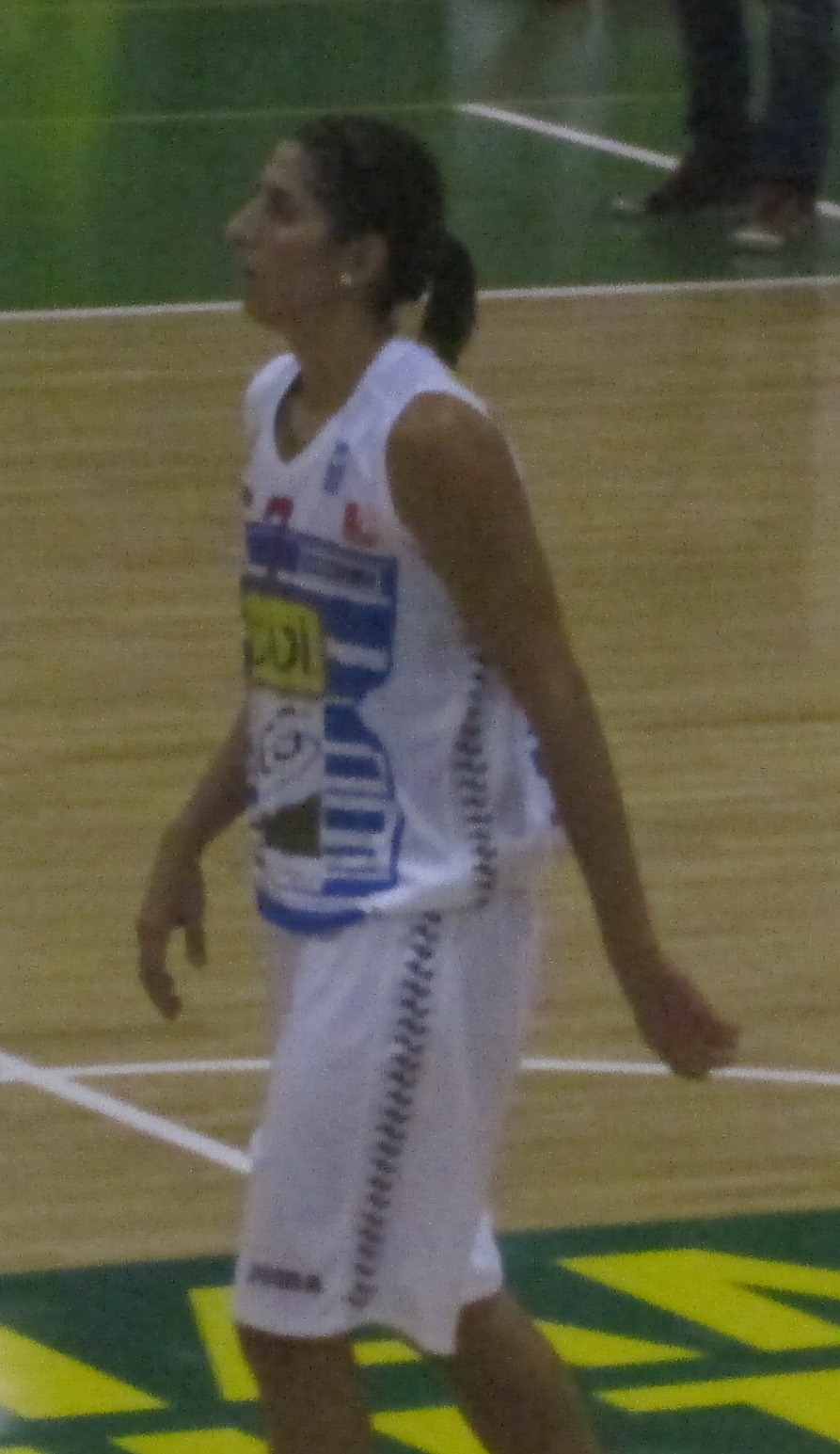 Maria Revuelto Olimpica española